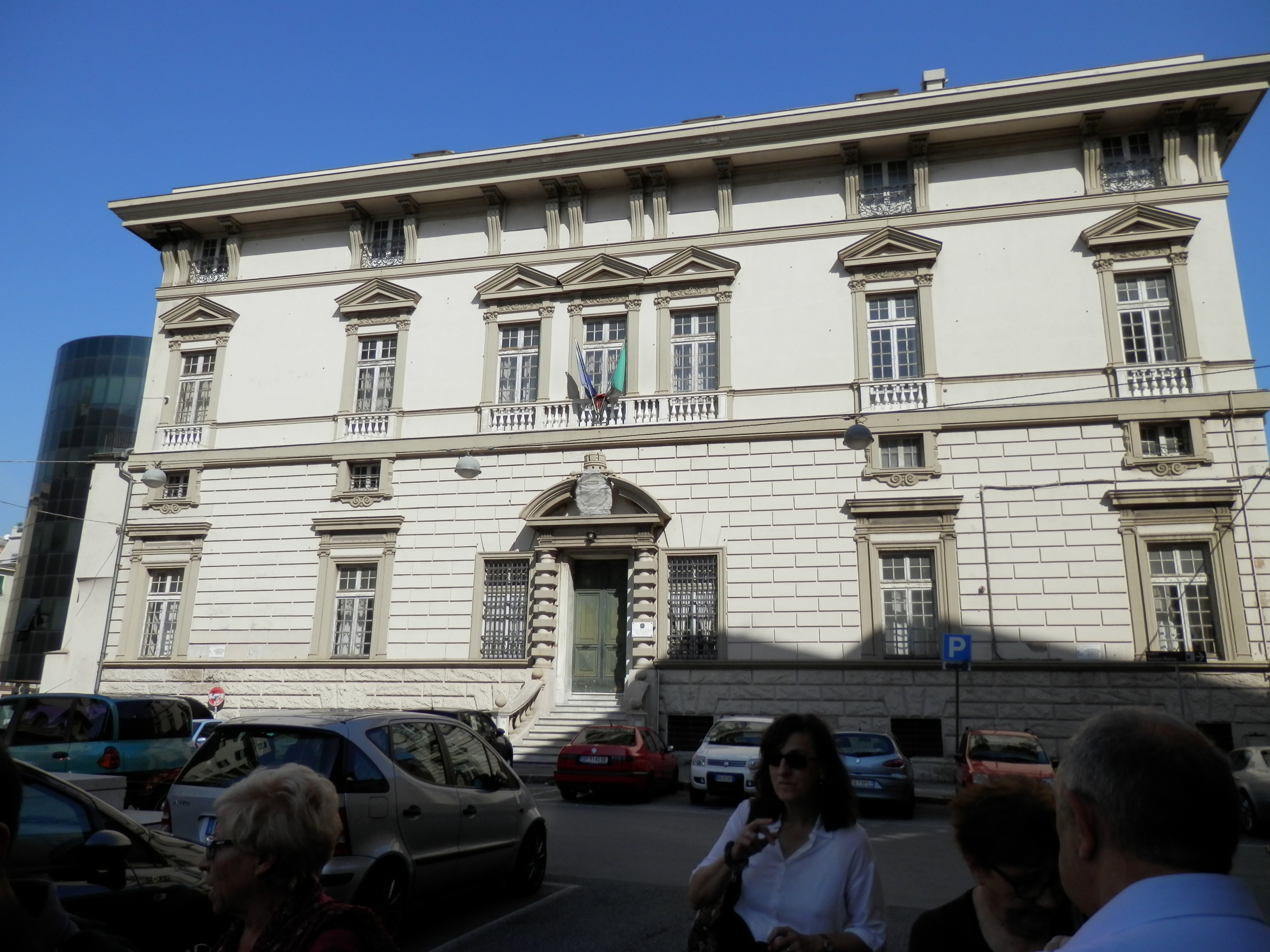 Villa Centurione del Monastero situata in piazza del Monastero a San Pier D'arena